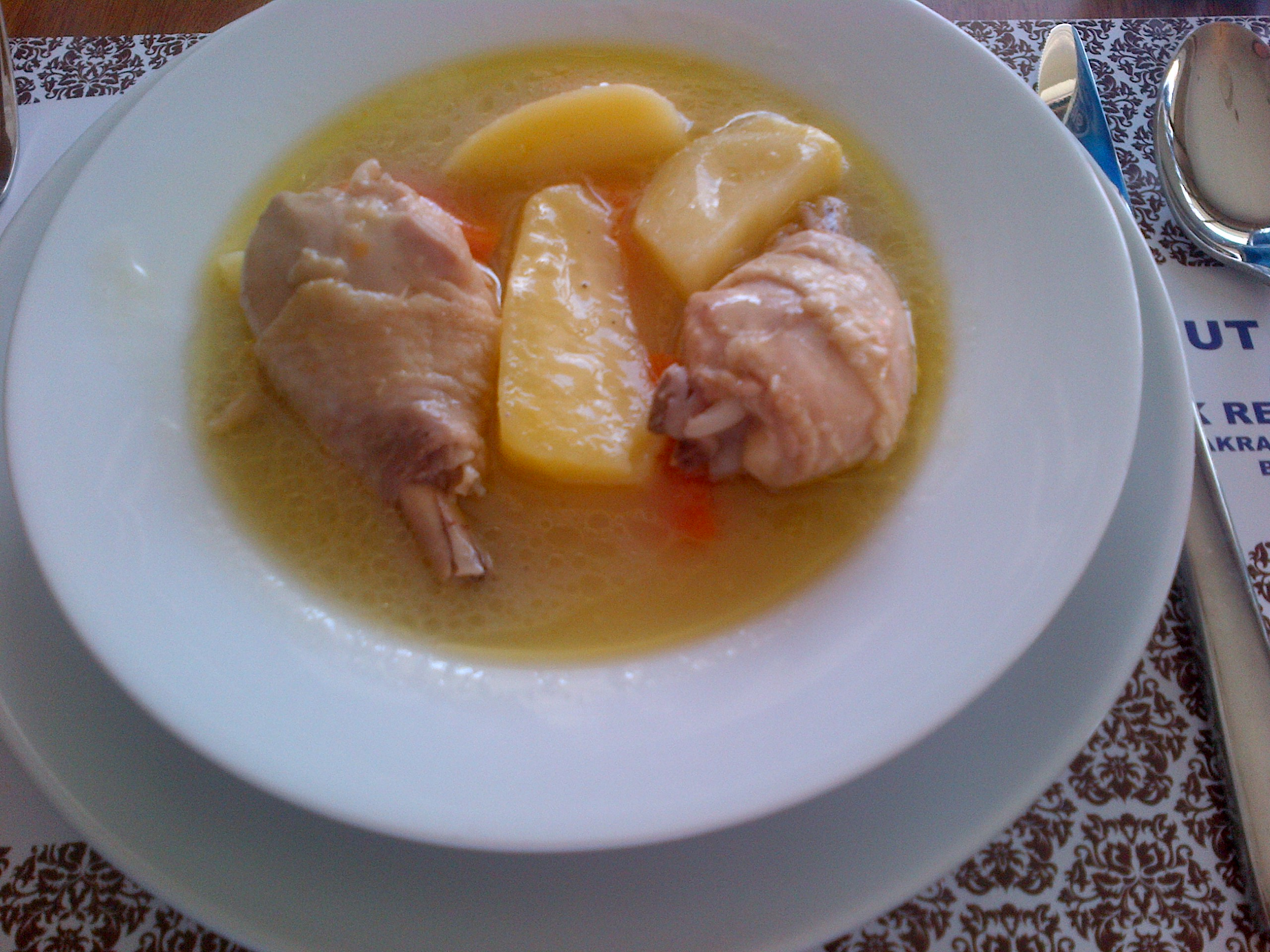 Tavuk haşlama, de la cocina turca.